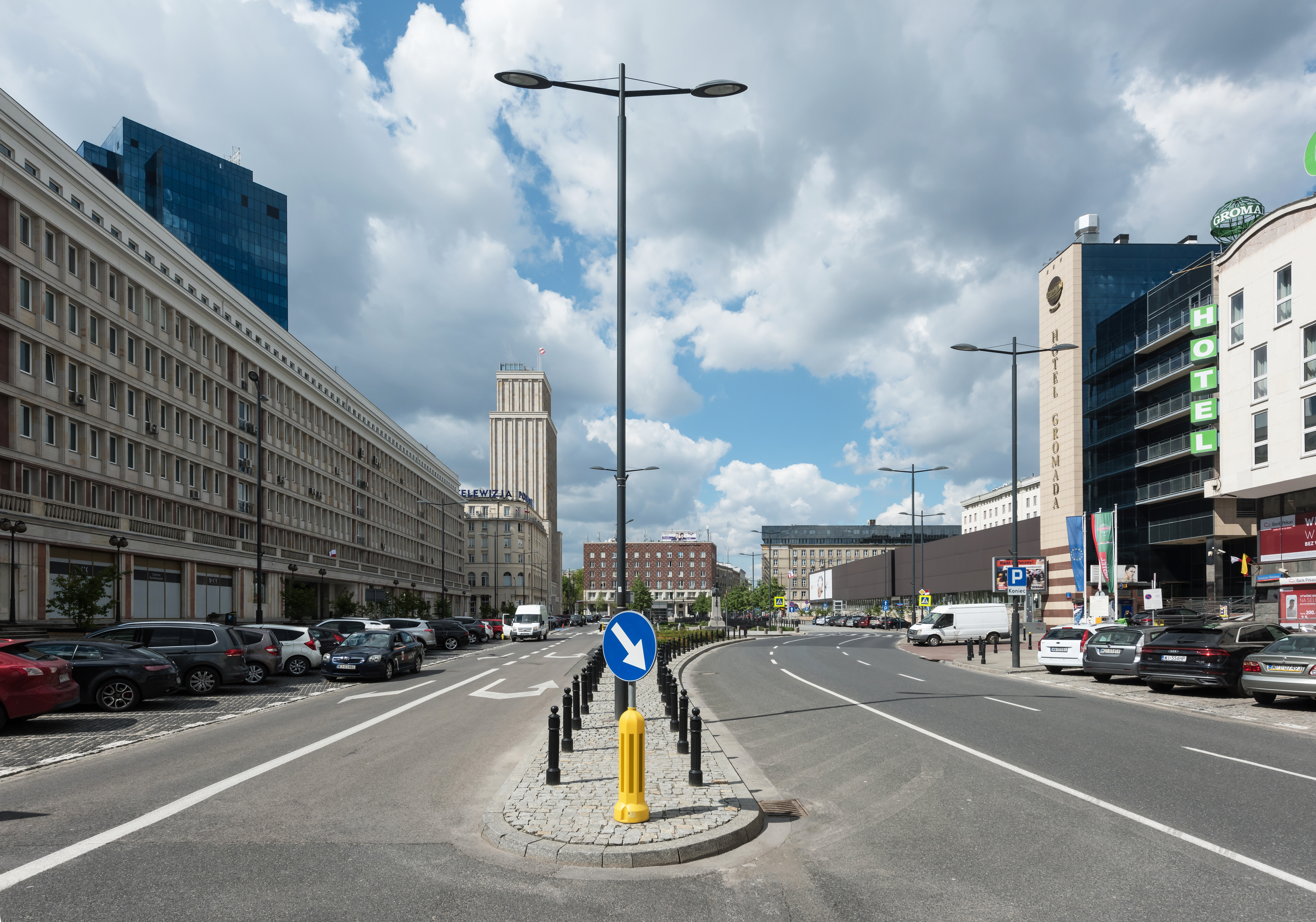 Plac Powstańców Warszawy w Warszawie, widok w kierunku północnym